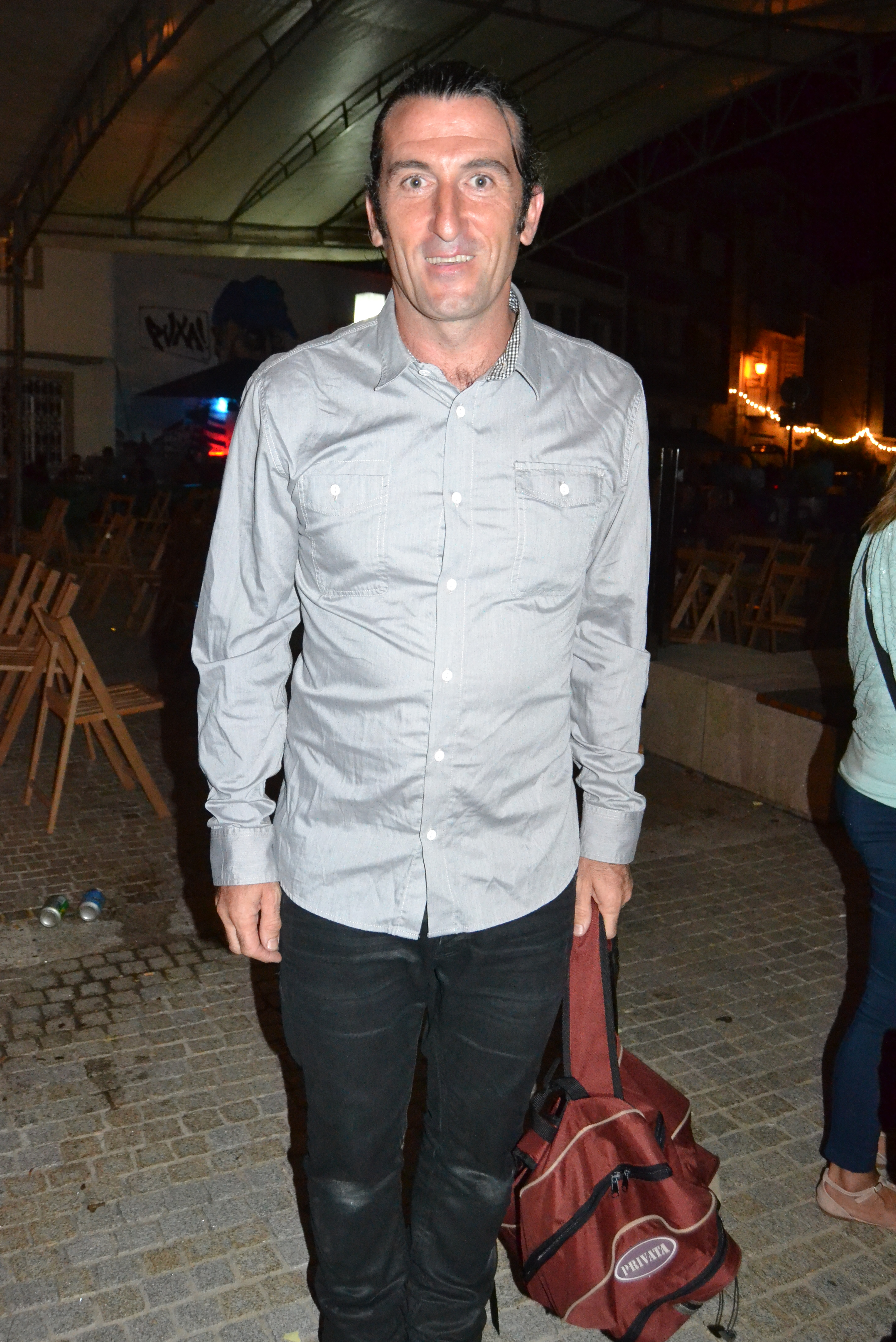 Luis Zahera nas festas da Guía 2014, en A Guarda